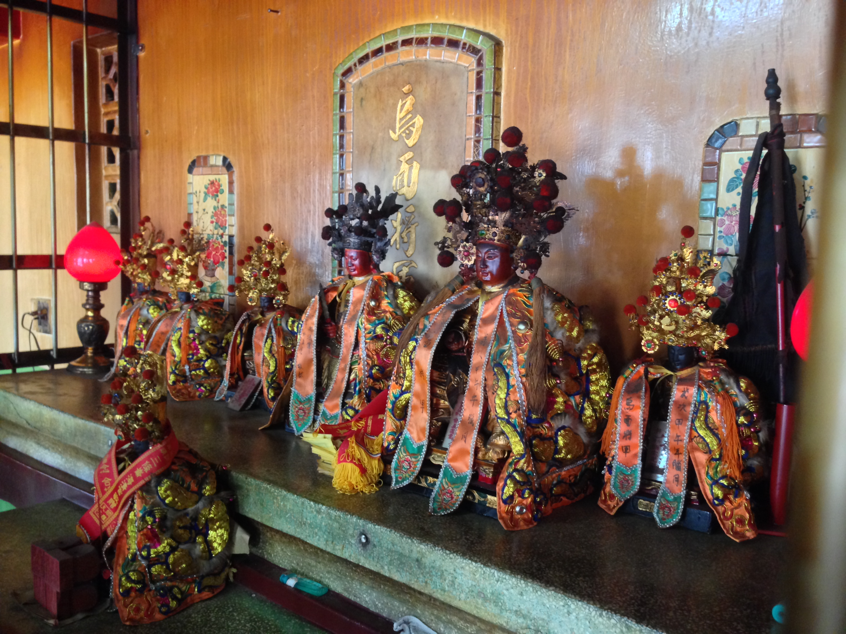 中文（台灣）: 烏面將軍廟神像